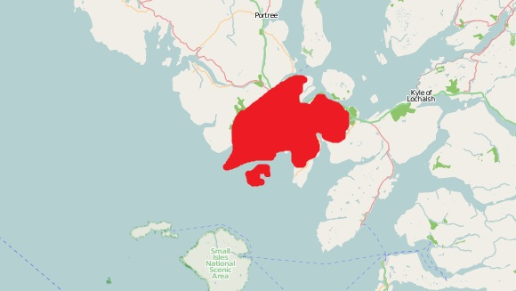 Een locatie kaartje van de Cuillin Hills